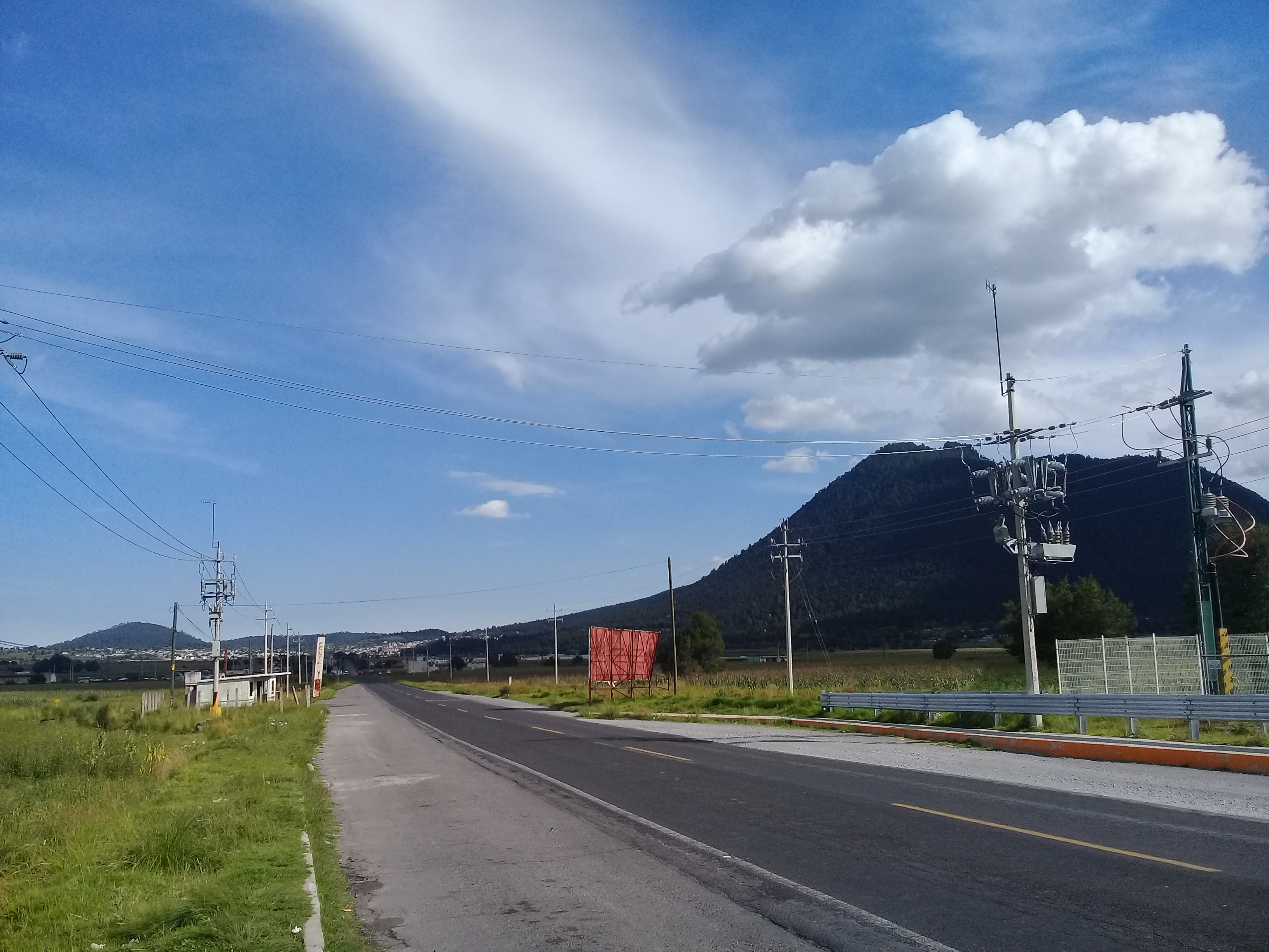 Frontera entre los estados de Puebla y Tlaxcala tomada desde el municipio de Zitlaltépec, Tlaxcala